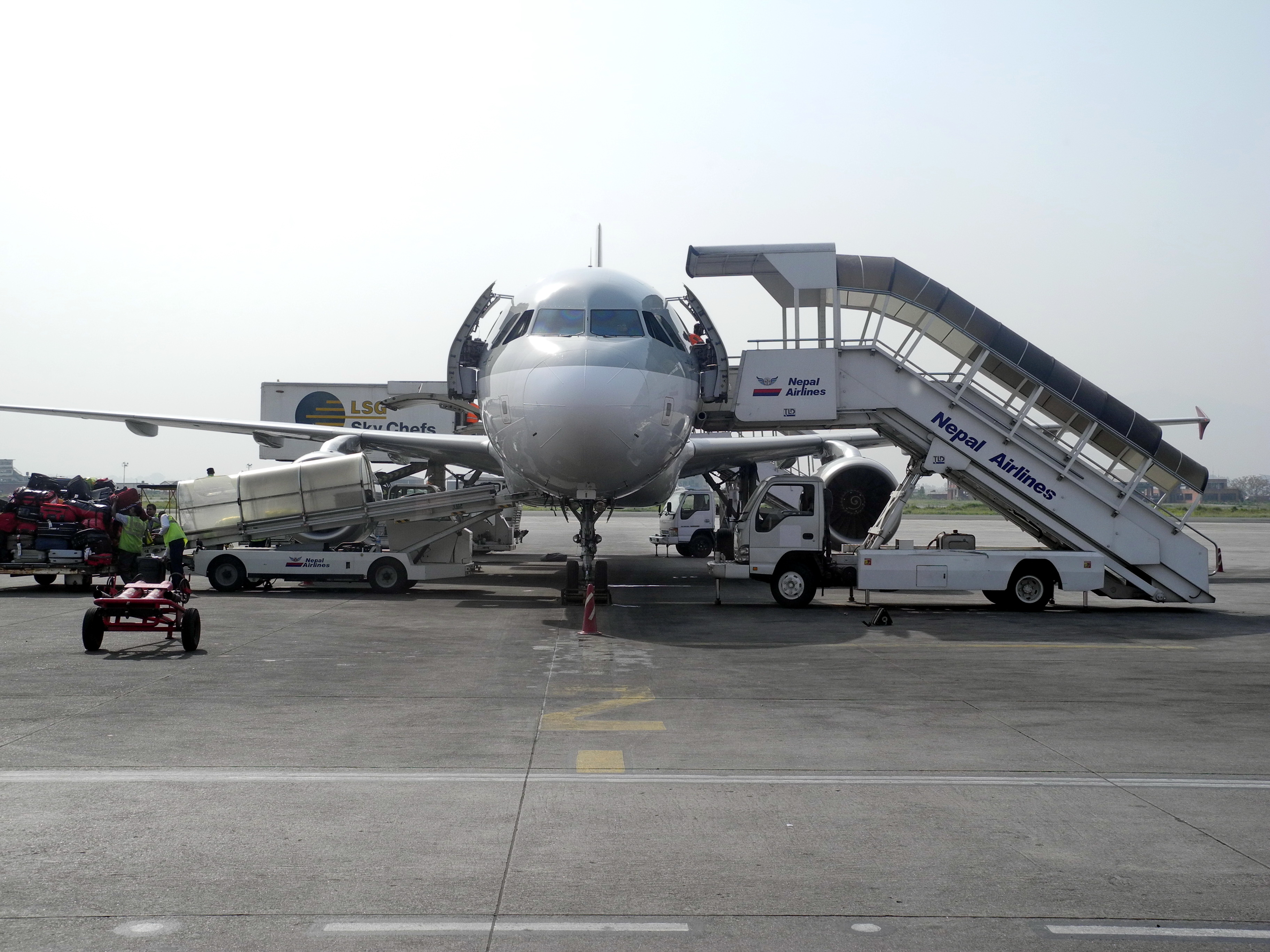 Kathmandu airport, tarmac